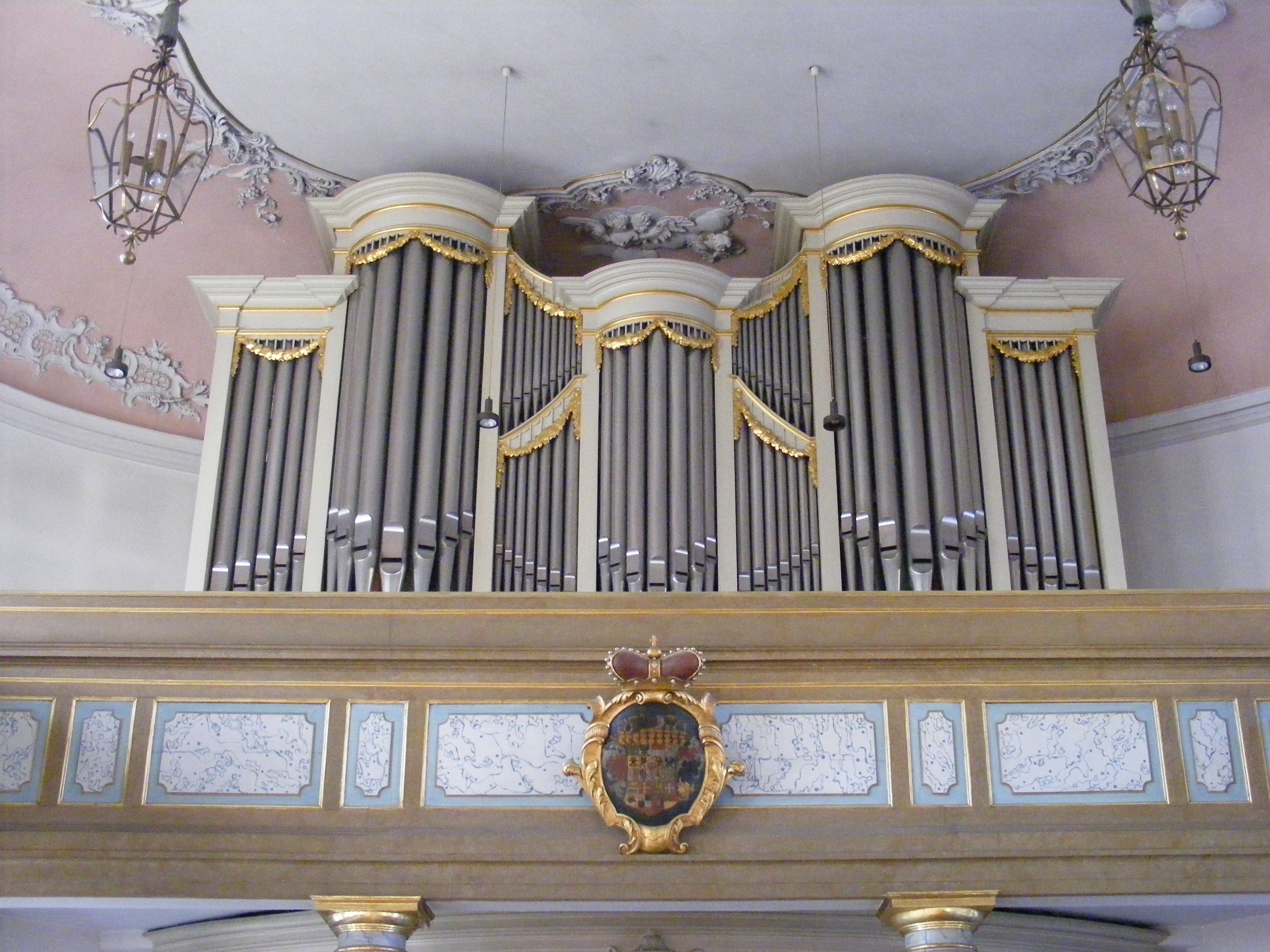 Bayreuth - Schlosskirche (Wappen und Orgel)